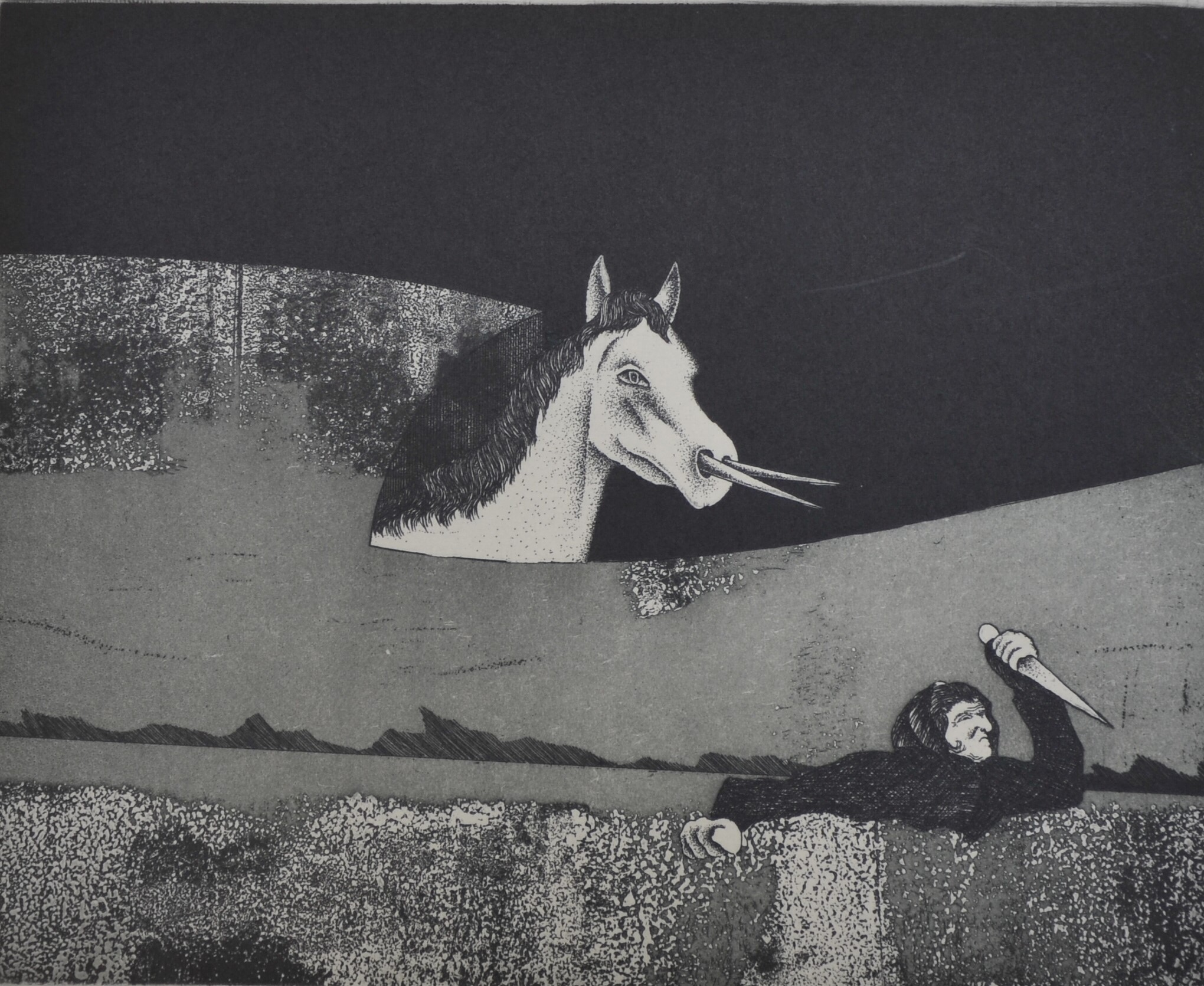 Ebrahim Ehrari, Verteidigung, 1974, Radierung (Aquatinta), 7/20, 30x40cm